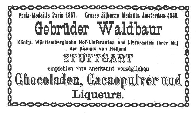 Anzeige der Firma Gebr. Waldbaur in Stuttgart im Adressbuch der Stadt Stuttgart, 1871.